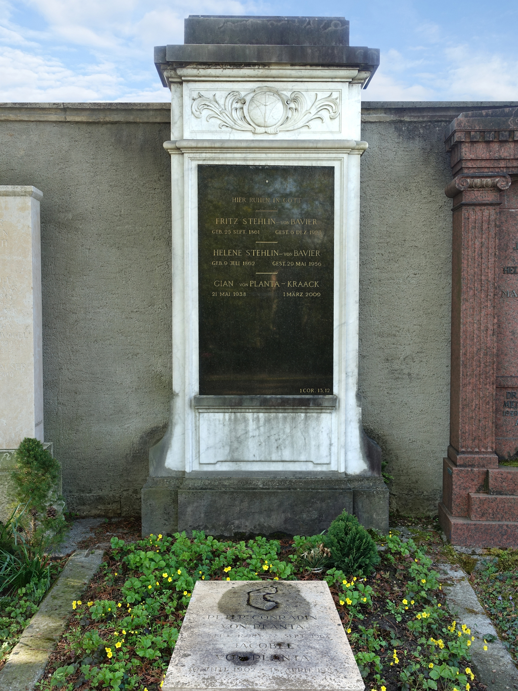 Fritz Stehlin-von Bavier (1861–1923) Architekt, Helena von Bavier (1862–1956), Gian von Planta-Kraack (1938–2009), Peter Conradin von Planta, Grab auf dem Friedhof Wolfgottesacker, Basel